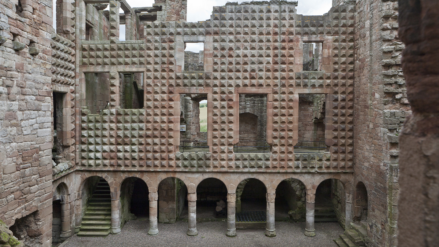 Crighton Castle, Schottland